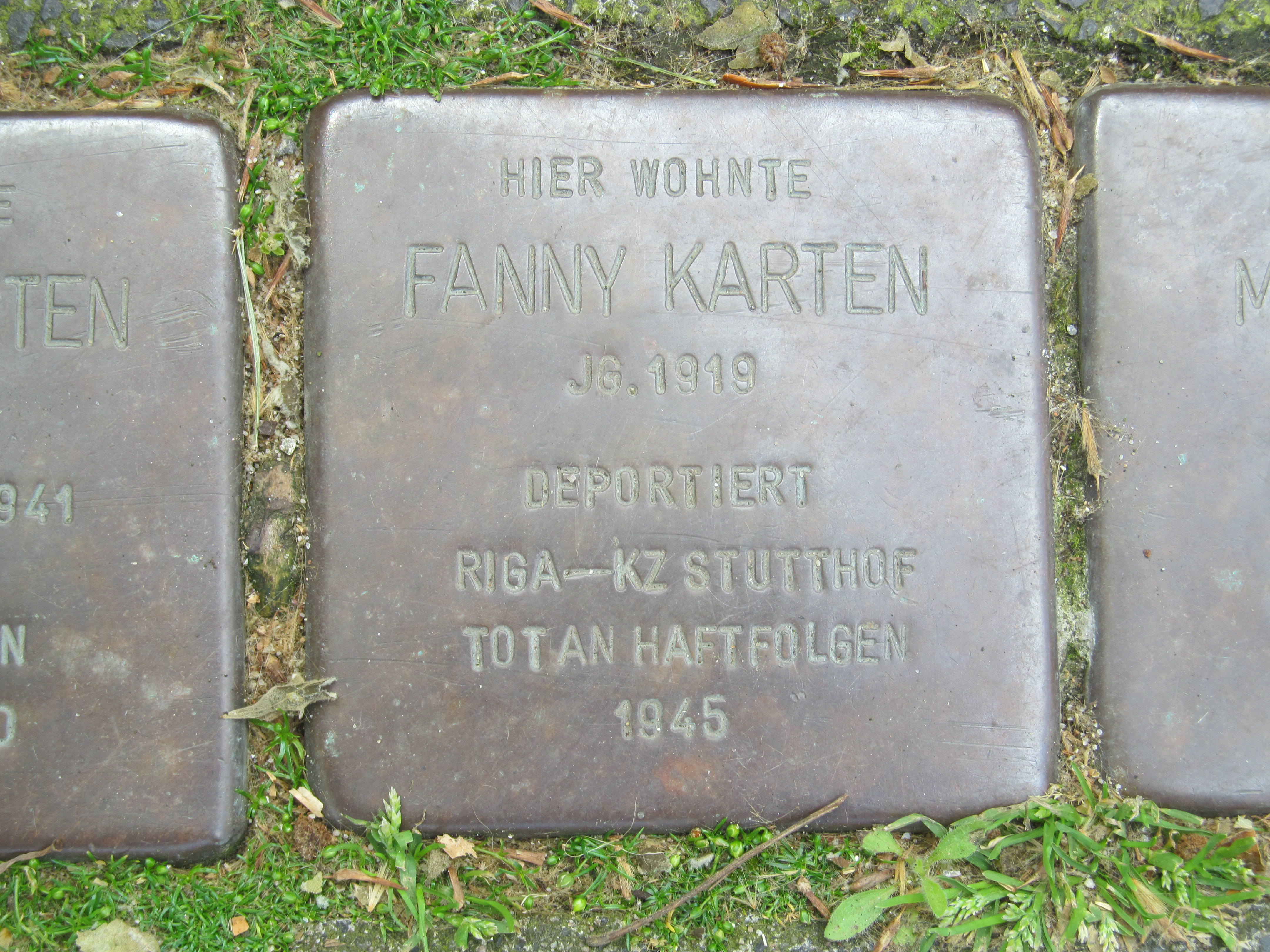 der Stolperstein für Fanny Karten vor dem Haus Rheinstraße 27 in Duisburg-Homberg